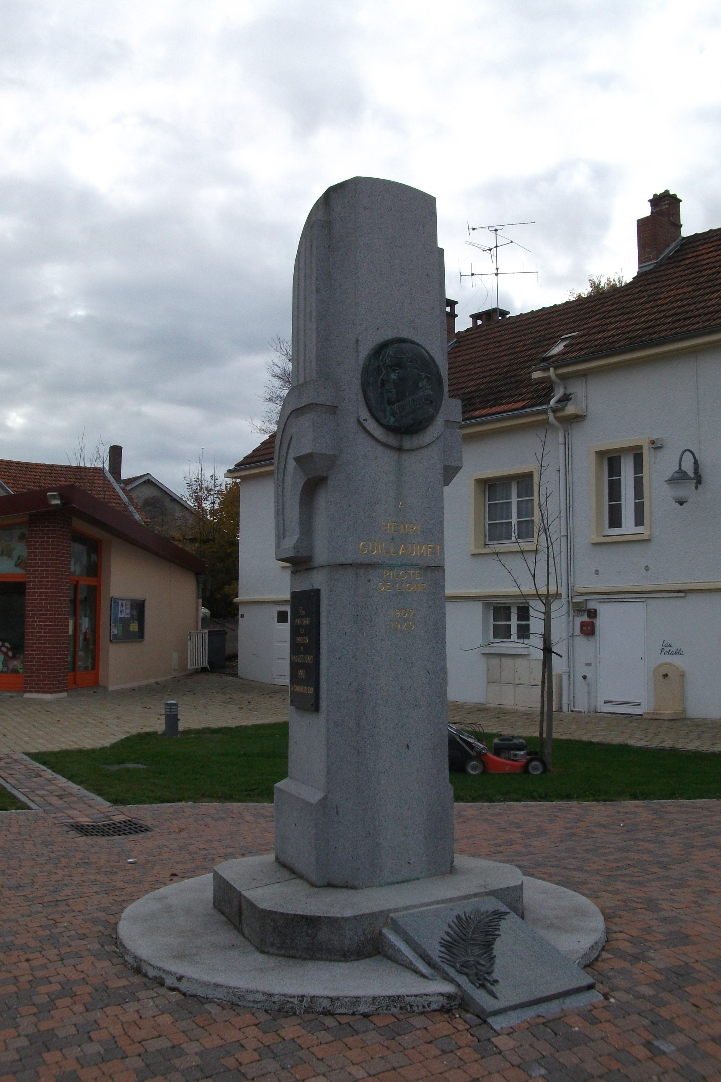 Bouy, sur la place du village, le monument à_Henri_Guillaumet.